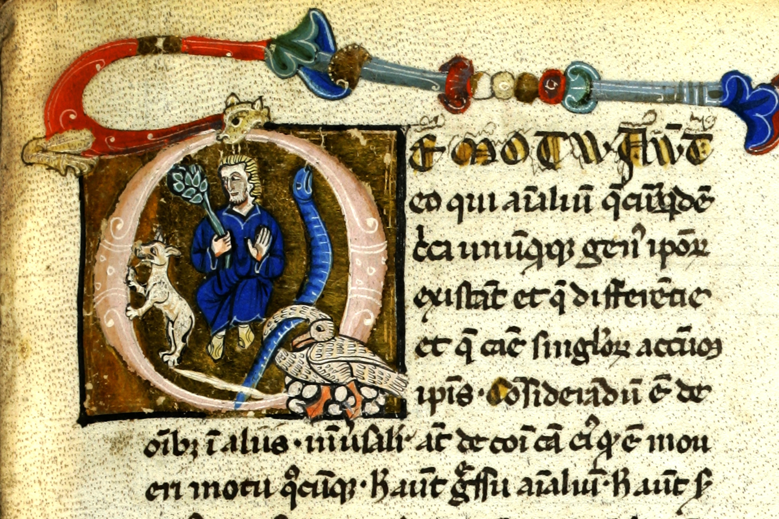 Aristoteles-Albertus-Magnus-Handschrift Italien, erste Hälfte des 13. Jh. Qualitativ hoch stehende, kunstvoll illuminierte Pergamenthandschrift. Neben aristotelischen und pseudo-aristotelischen Werken und verschiedenen Kommentaren enthält die Sammelhandschrift die naturwissenschaftlichen Abhandlungen «De mineralibus» [Über die Mineralien] und «De natura loci» [Über die Beschaffenheit des Geländes] von Albertus Magnus.